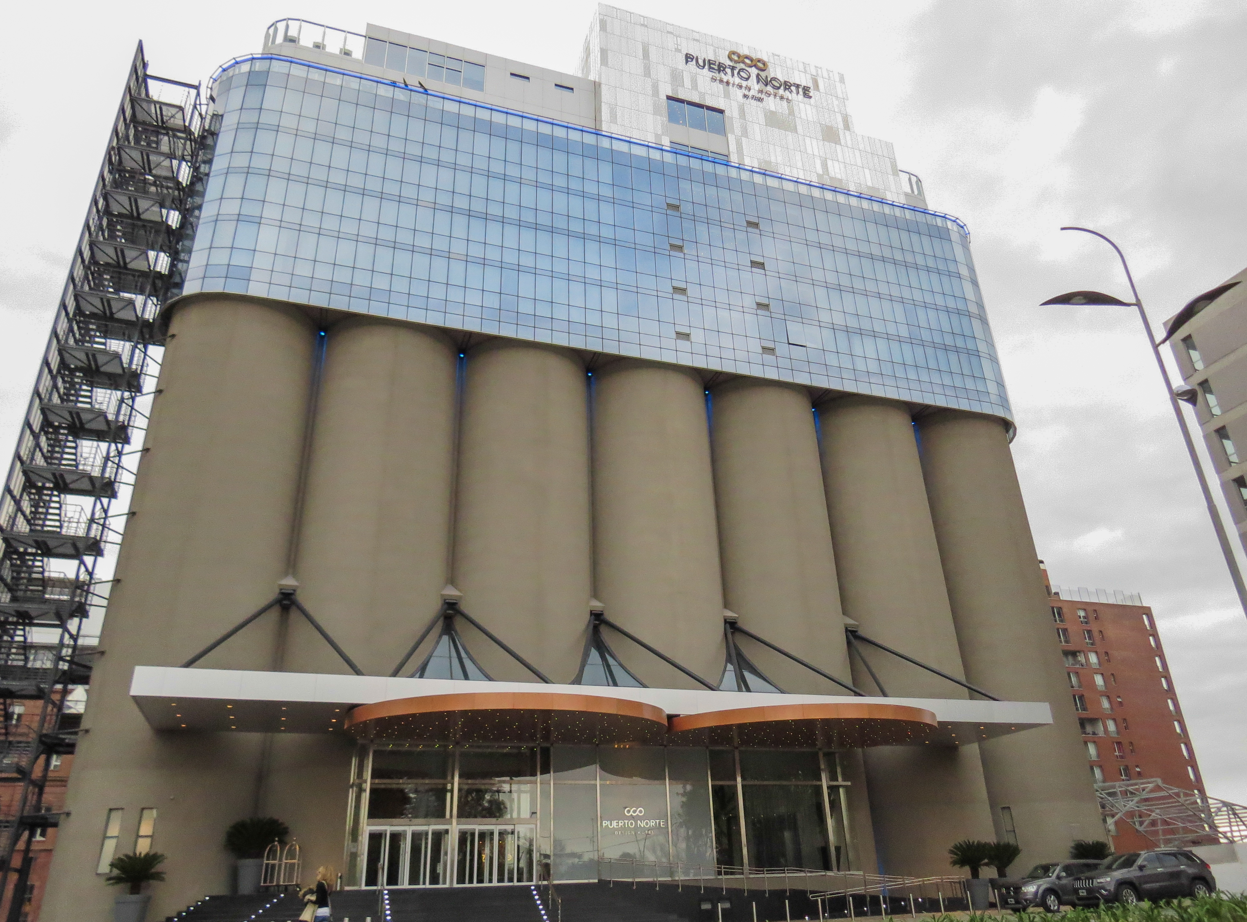 Hotel Puerto Norte (Arq. Gabriela Iglesias, 2014-15), construido sobre los antiguos silos de la ex unidad III. Carballo 148, Rosario, Argentina.